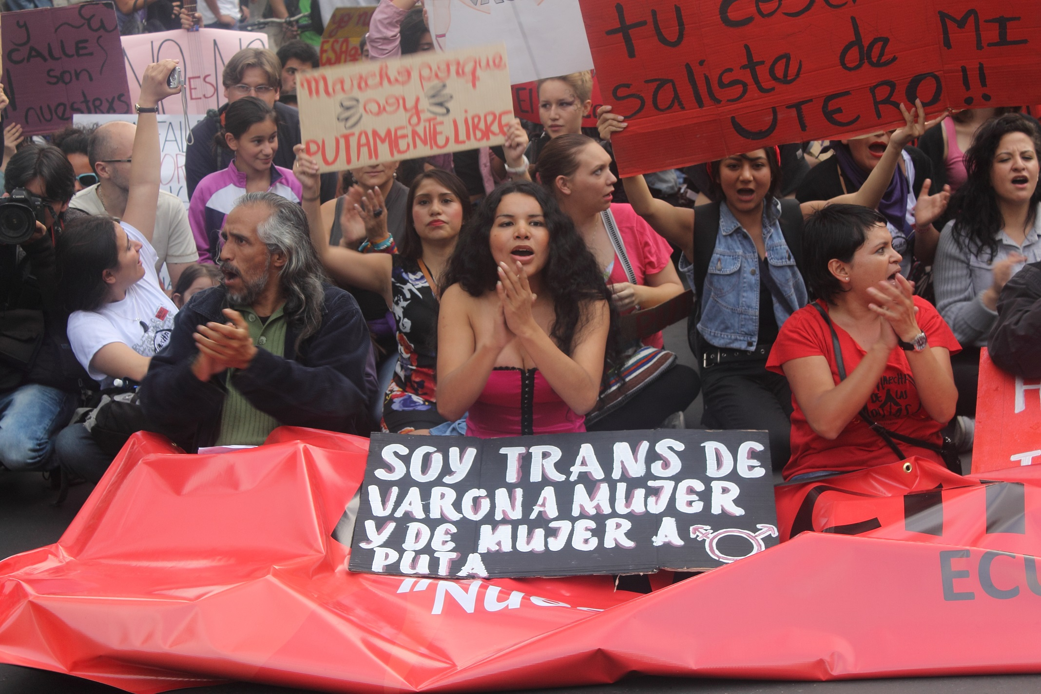 Marcha de las Putas 2014 Arco del Ejido Quito - Ecuador - Por un ecuador sin violencia contra la mujer y trans (3) Diane Rodríguez